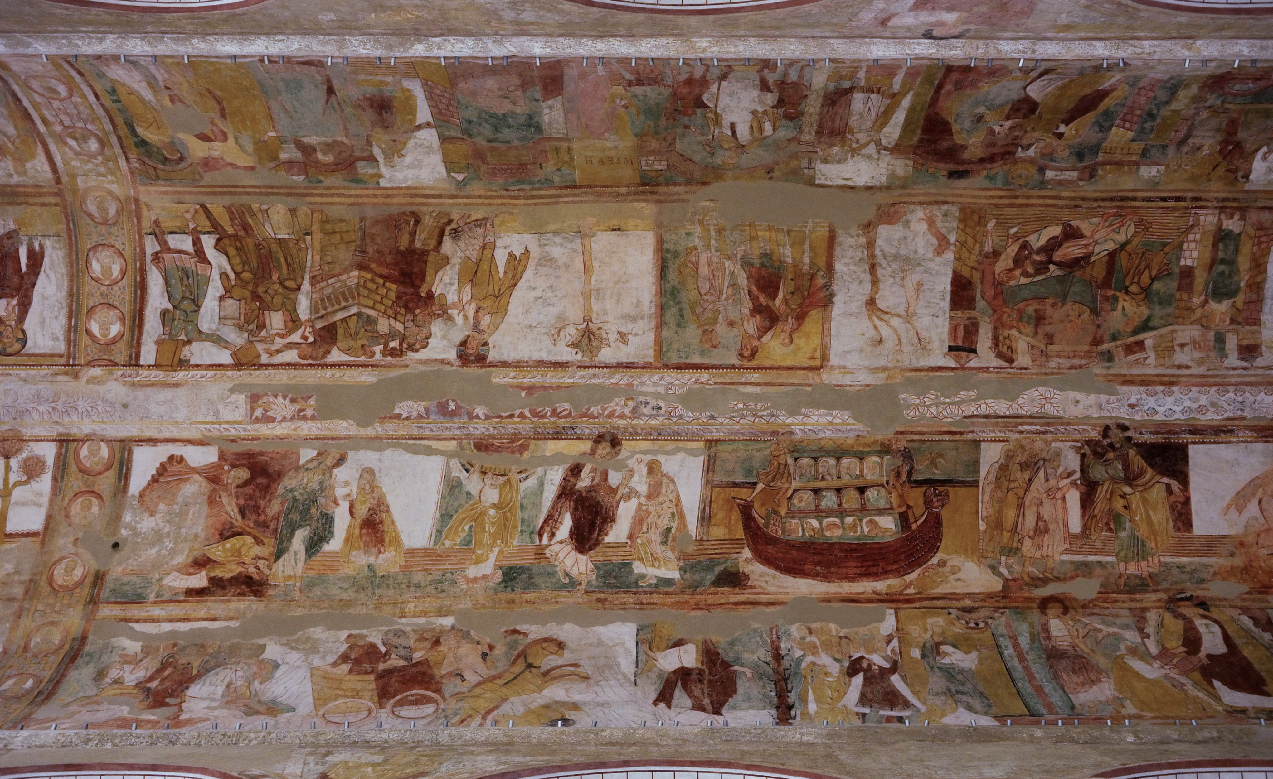 Voir compartimentation